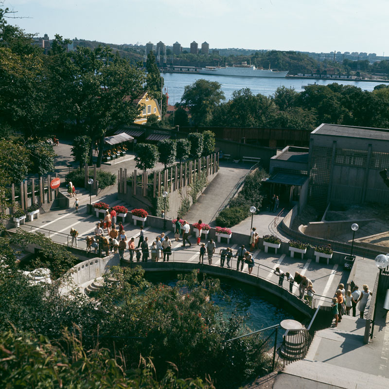 Elefanthuset på Skansen, ritat av Holger Blom.